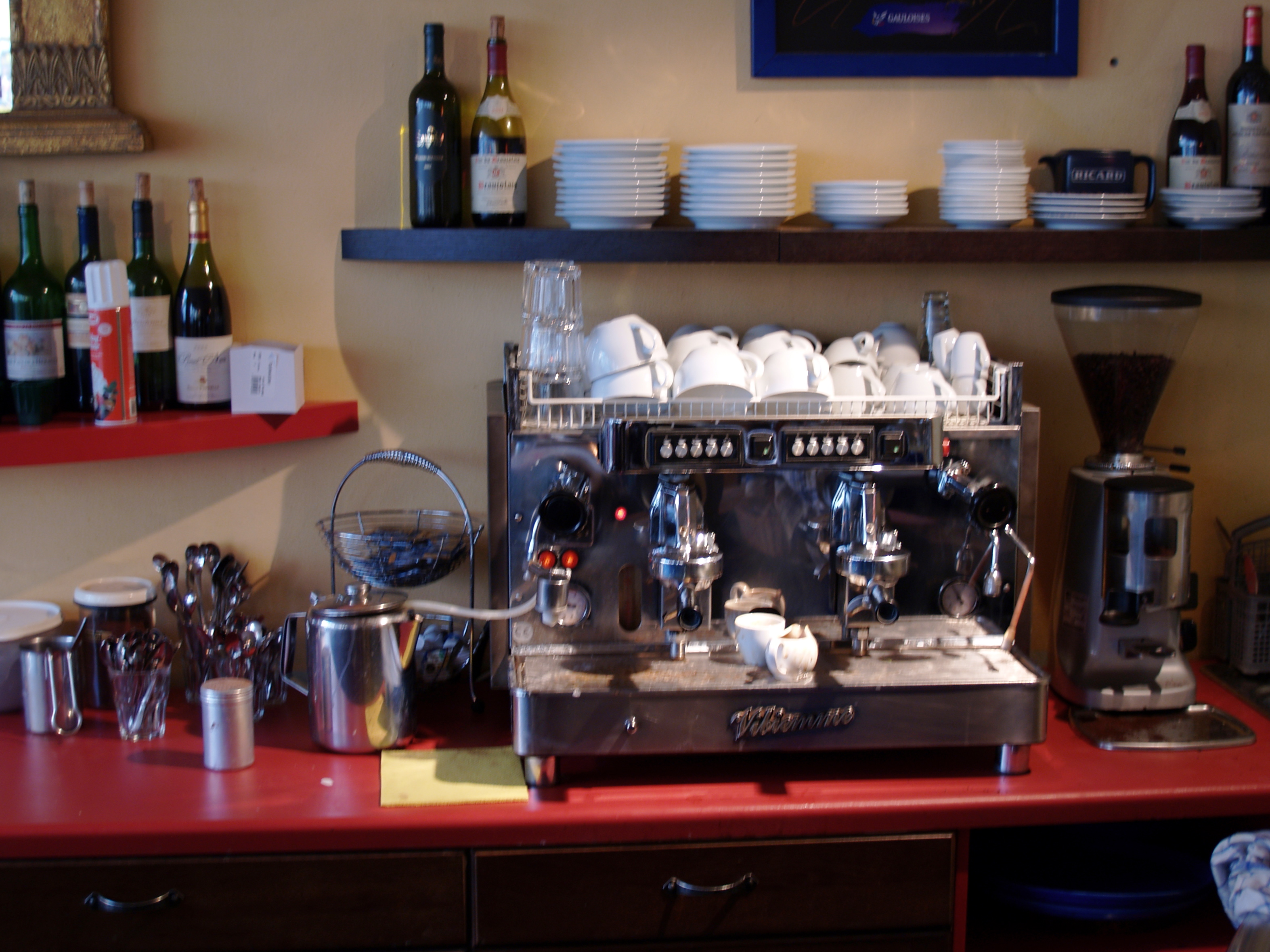 Andrax, Own work, Espresso machine. User:BMK: geradegestellt, aufgehellt